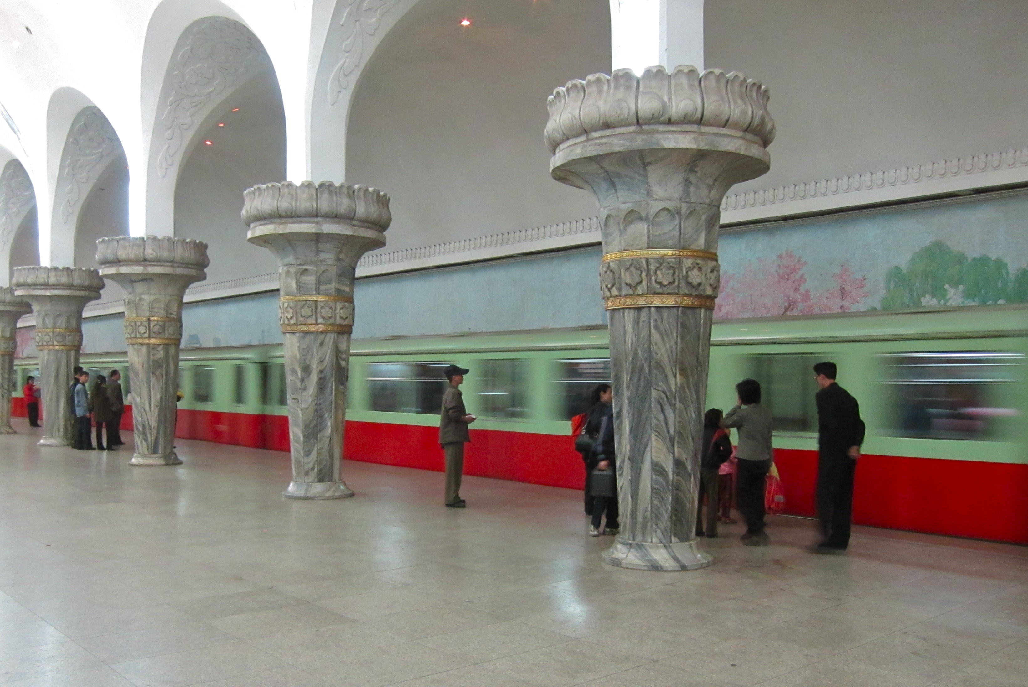 Yonggwang Station, Pyongyang Metro Pyongyang, DPRK (North Korea)